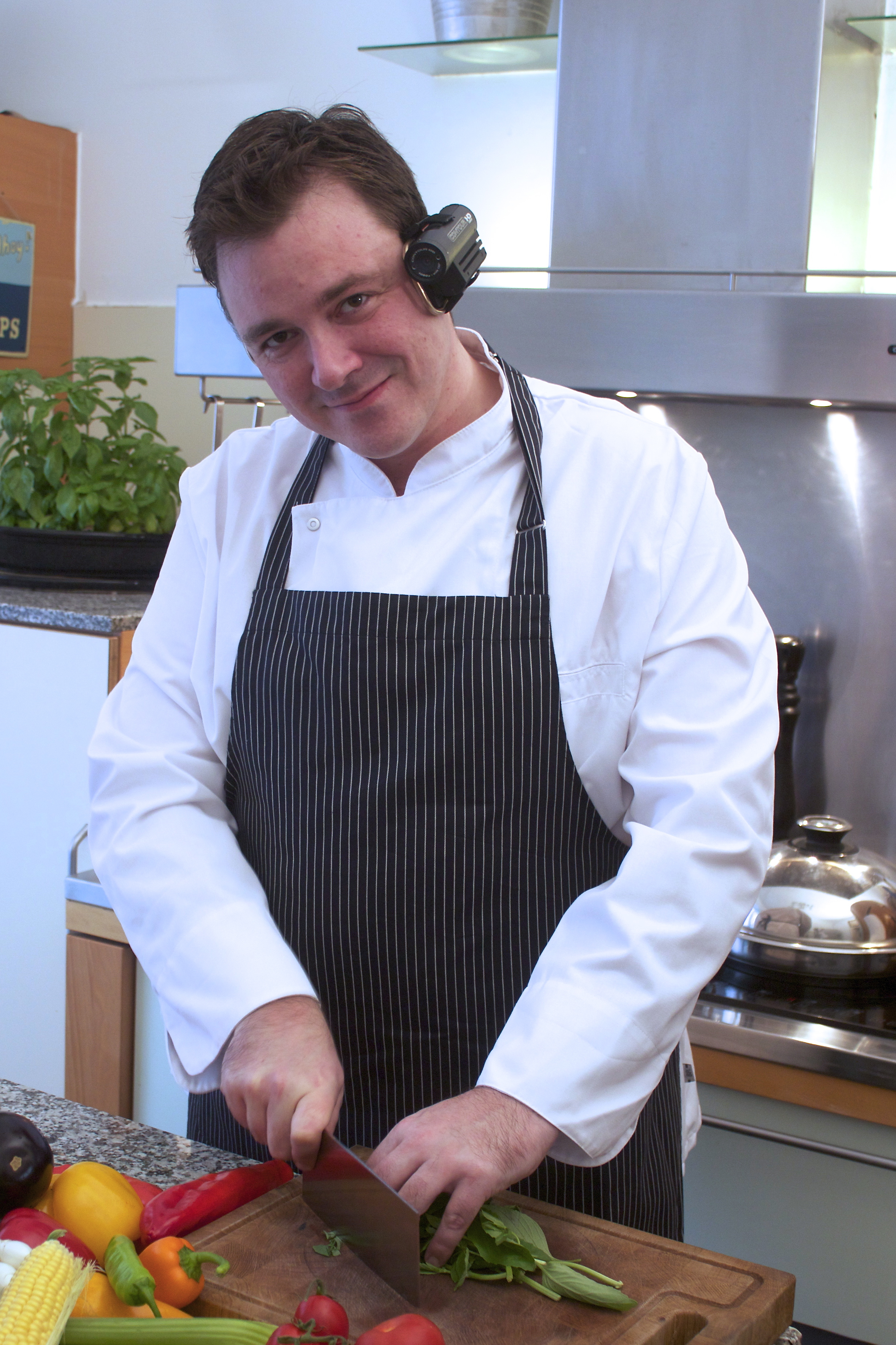 Thomas Sixt ist ein deutscher Koch, Autor von Kochbüchern, zertifizierter Ernährungstrainer, Foodfotograf und Verleger von Koch-Apps und digitalen Publikationen.